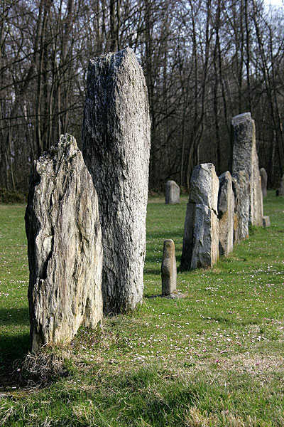 Menhire von Clendy bei Yverdon